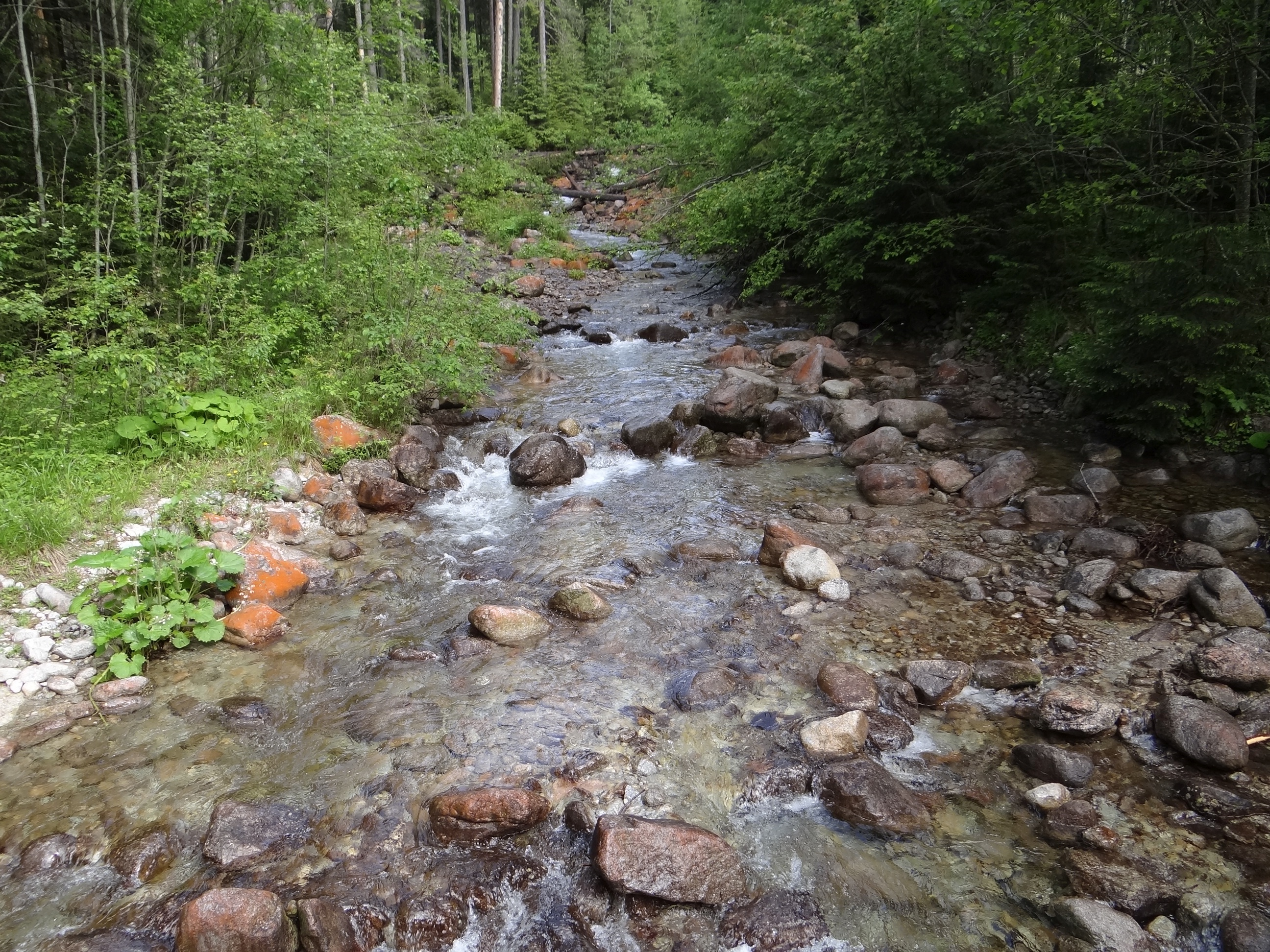 Waksmundzki Potok przed ujściem do Białki